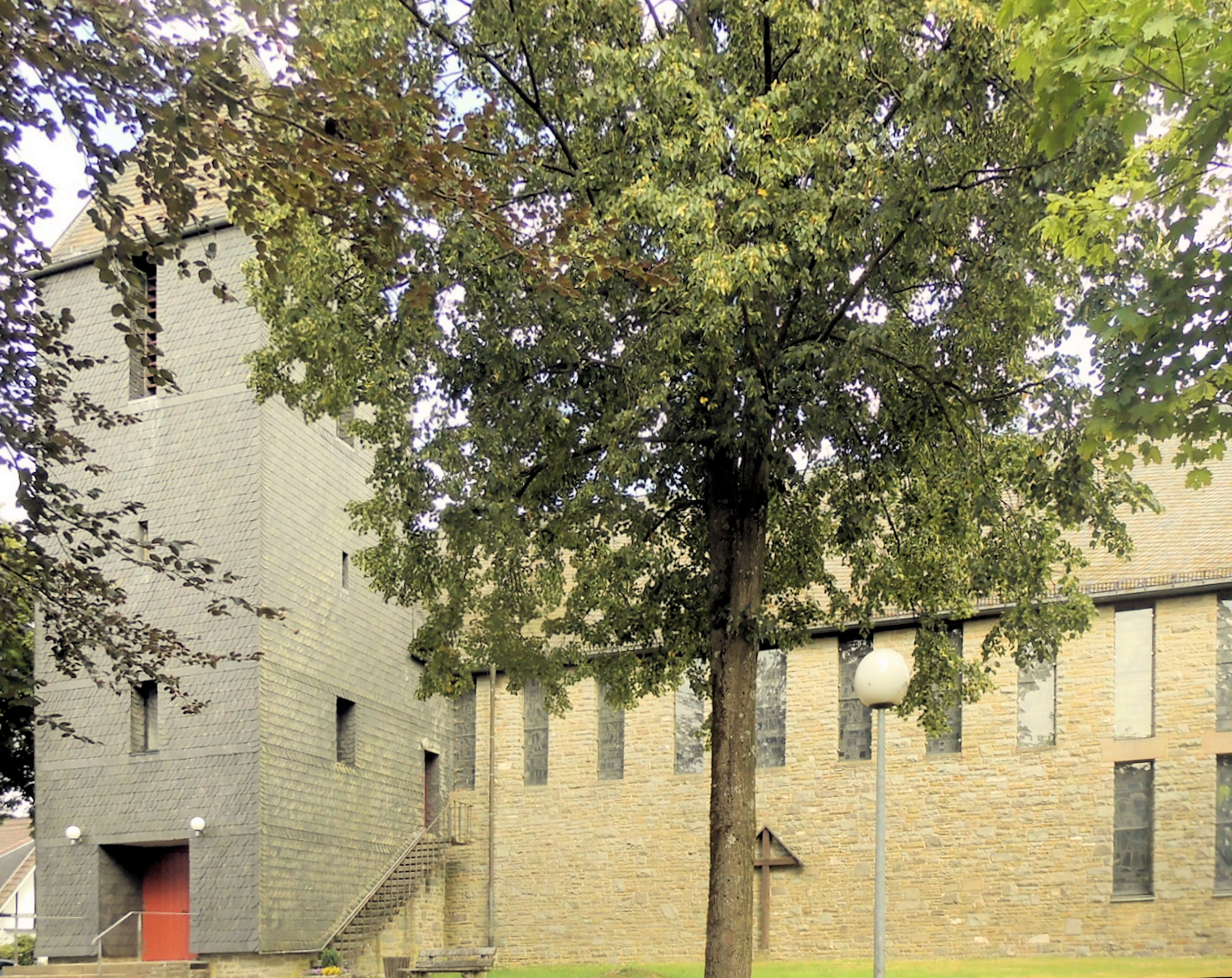 Kirche St. Joseph in Lichtenberg, Gemeinde Morsbach